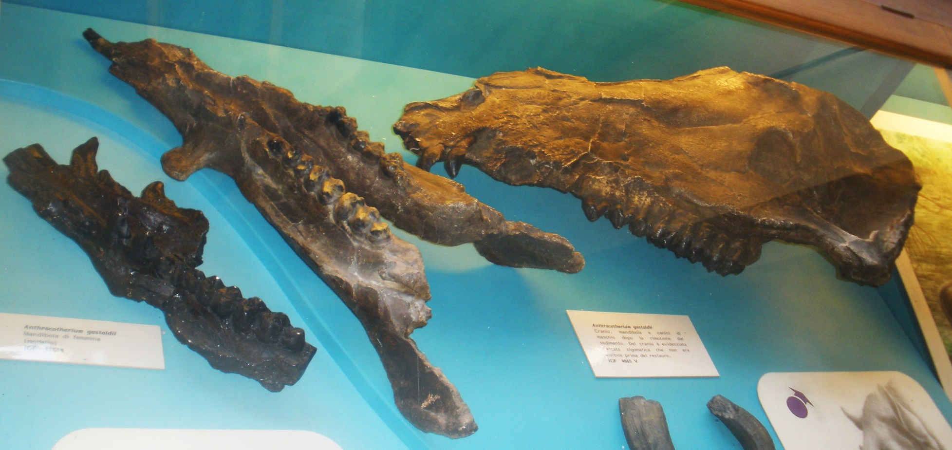 Fossil of Anthracotherium, an extinct mammal - Took the picture at Museo Paleontologico di Firenze